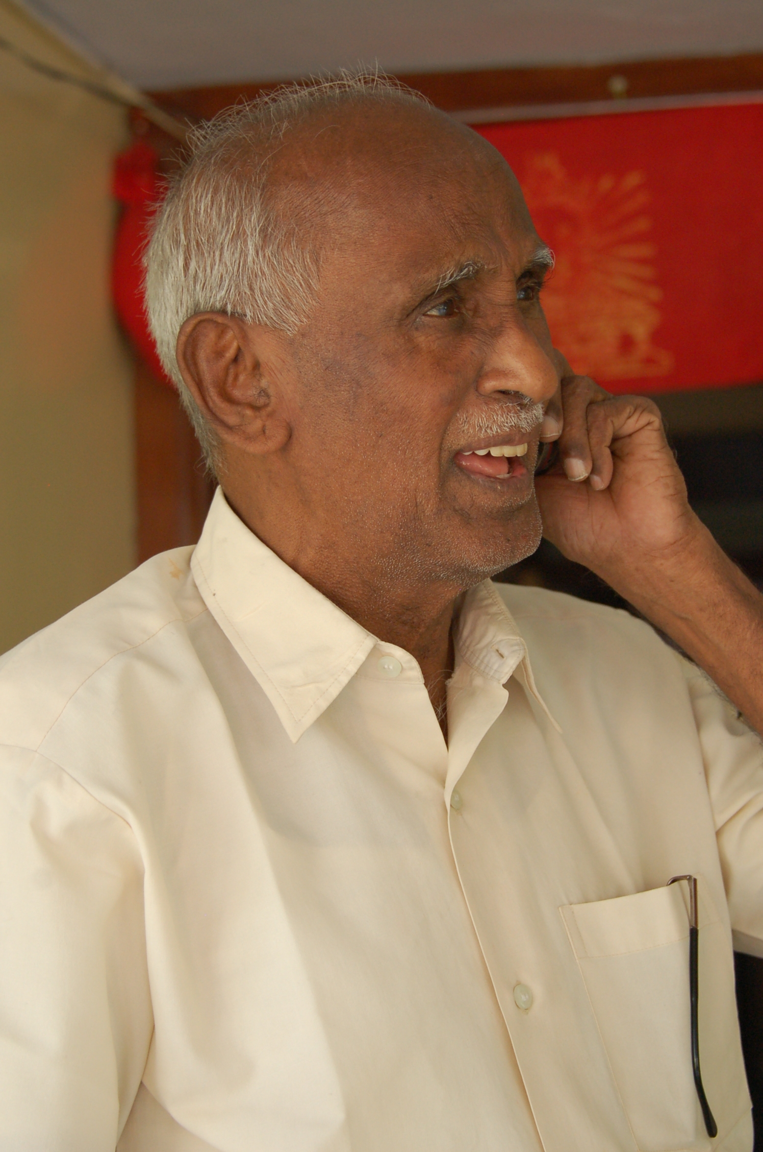 தமிழறிஞரும், மொழியியலாளரும் ஆன பேராசிரியர் செ.வை.சண்முகம் (திசம்பர் 24, 2011) அவர்களின் படம். படம் எடுத்தவர் செ.இரா.செல்வக்குமார் (C.R.Selvakumar). இடம் சிதம்பரம், தமிழ்நாடு.Professor S.V. Shanmugam, Tamil scholar and linguist, Chidambaram, Tamil Nadu, India. Date December 24, 2011. Photopgrapher C.R. Selvakumar